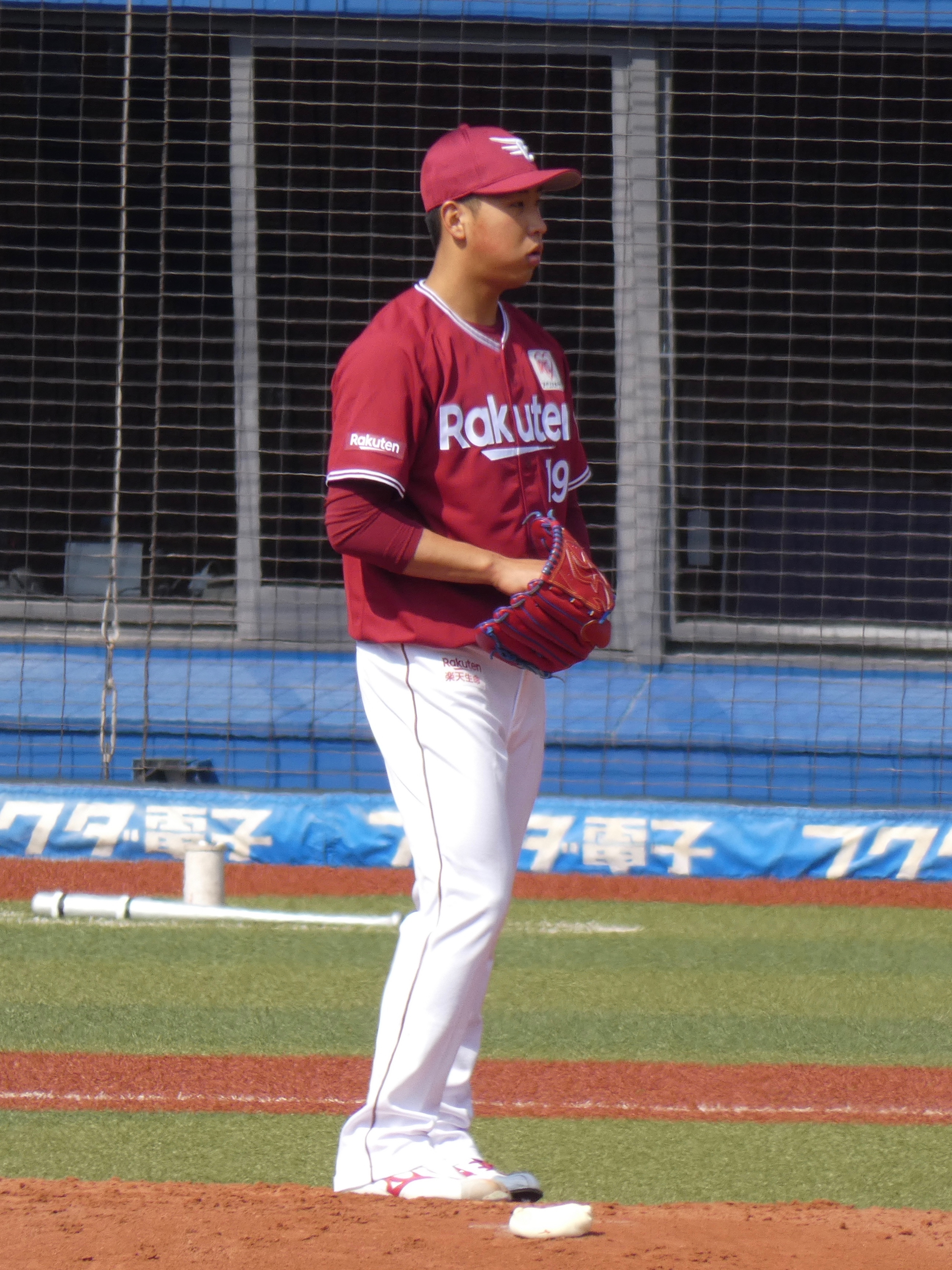 東北楽天ゴールデンイーグルスの選手「藤平尚真」。ZOZOマリンスタジアムにて。